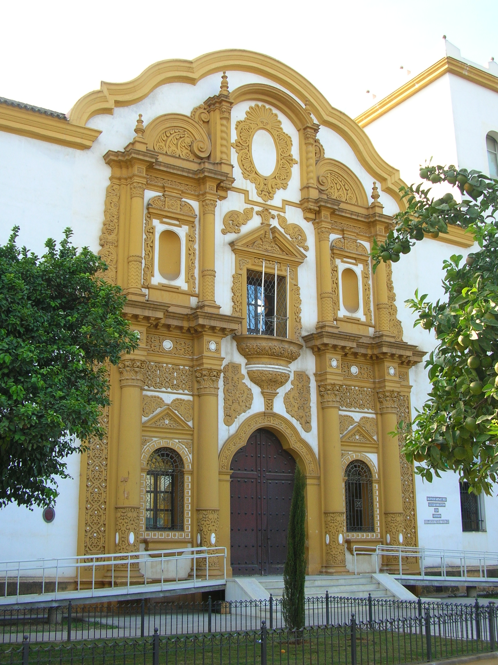 Pabellón argentino de la Exposición Ibero-Americana de Sevilla de 1929 (actual Escuela de Danza)